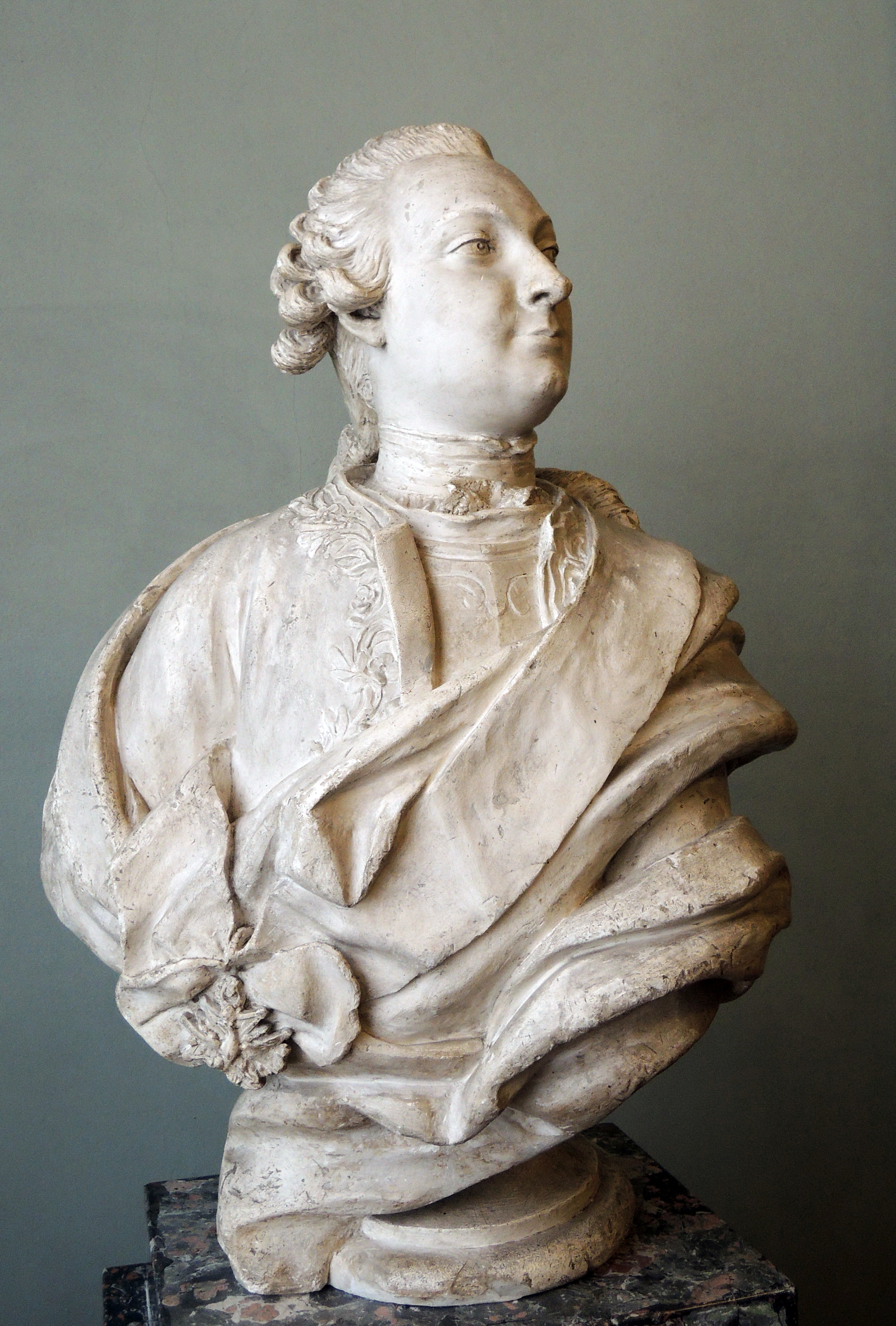 Бюст Ивана Ивановича Шувалова. Скульптор Николя-Франсуа Жилле. 1760. ГРМ